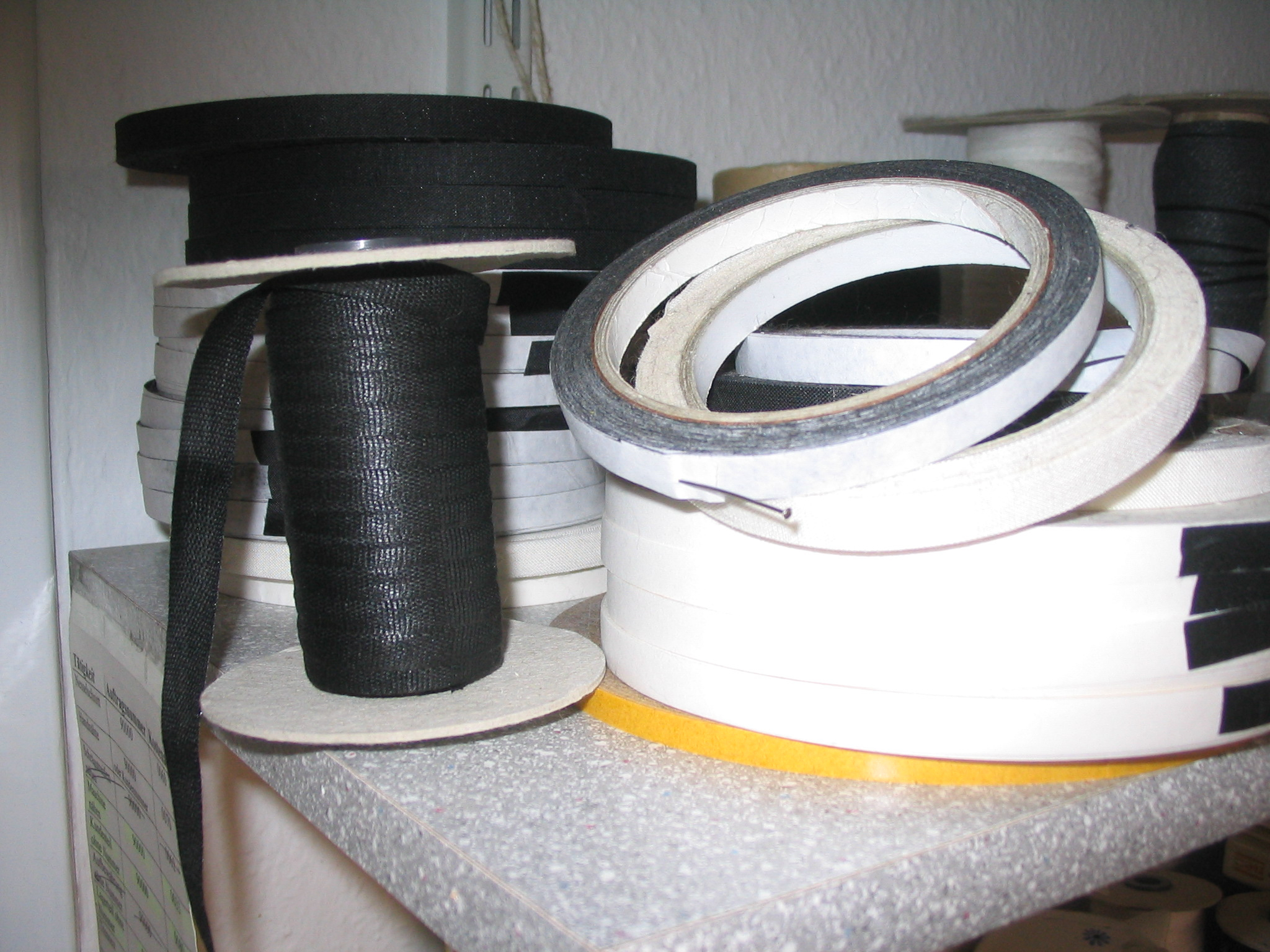 Bändelband in einer Düsseldorfer Kürschnerei